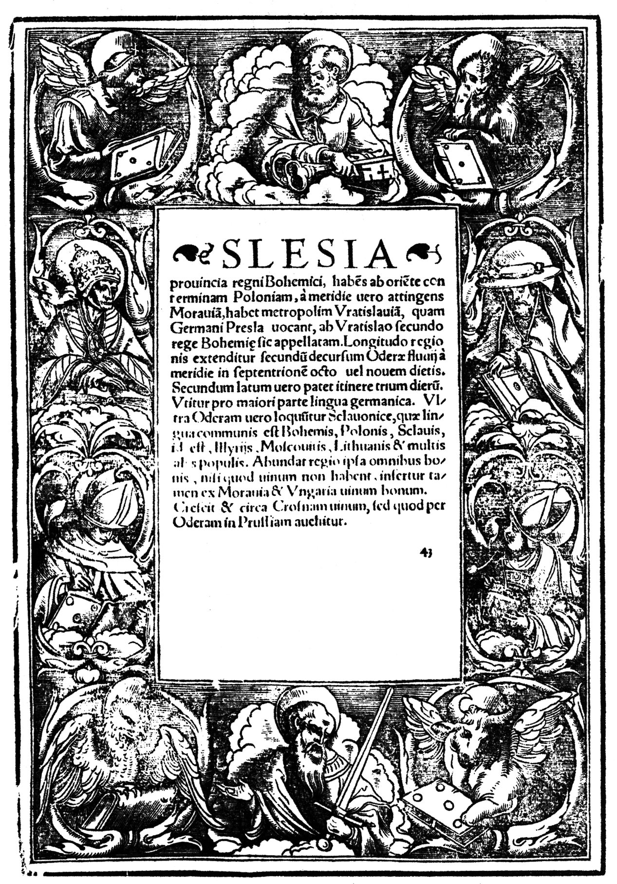 Silesia, 1 strona z mapy z Münstera